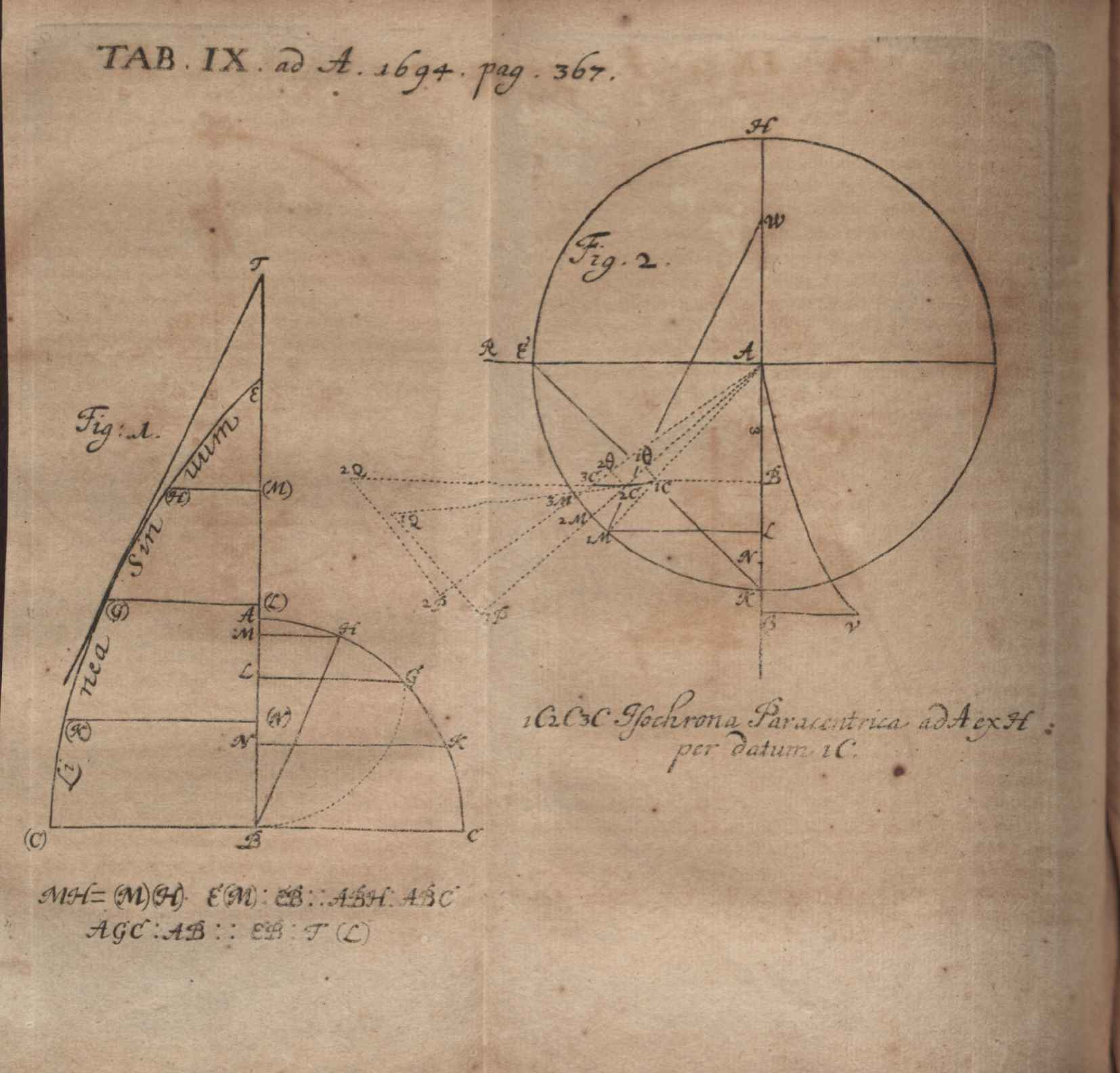 Illustration